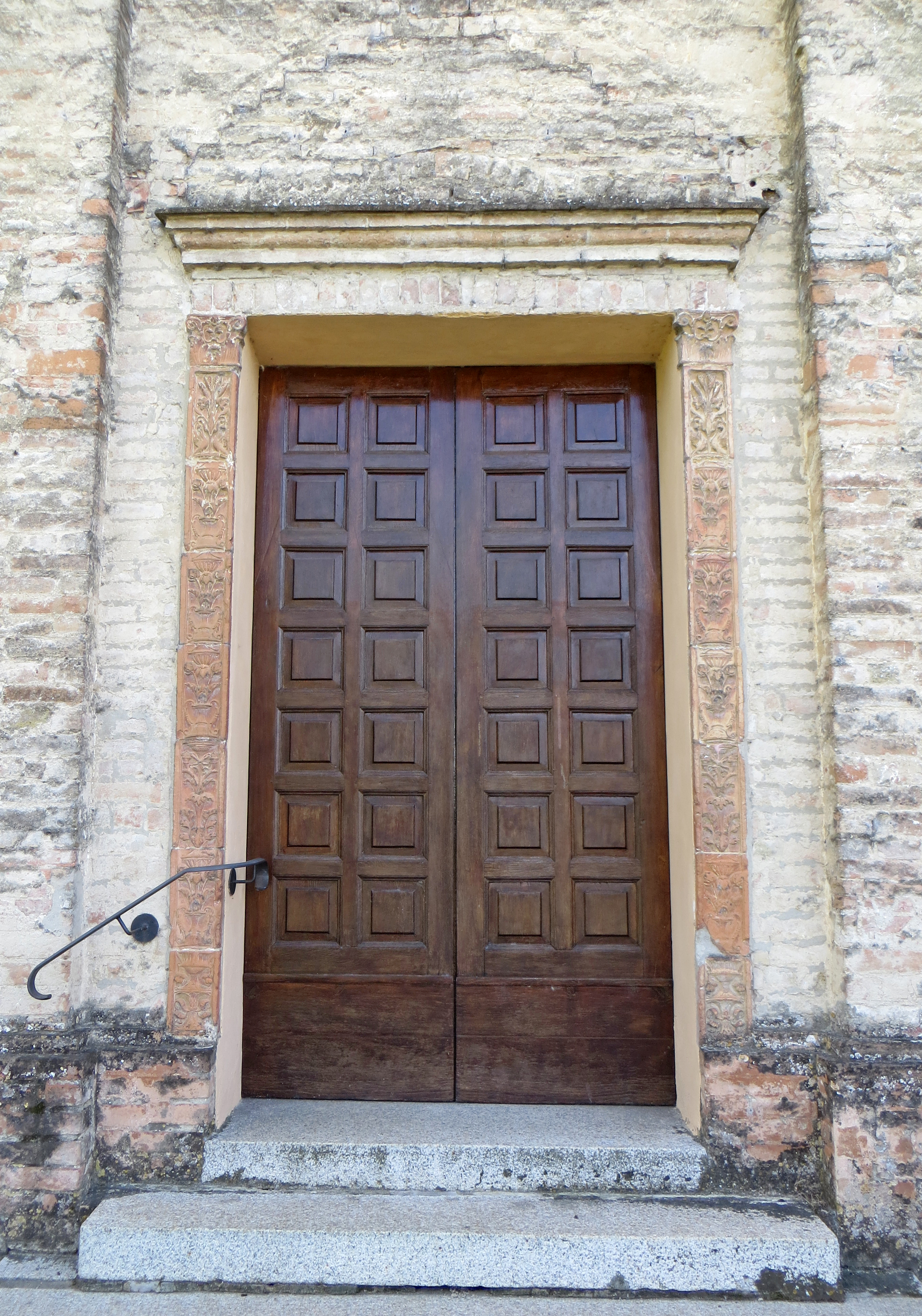 Chiesa di San Giovanni Battista (Pedrignano, Parma) - portale d'ingresso